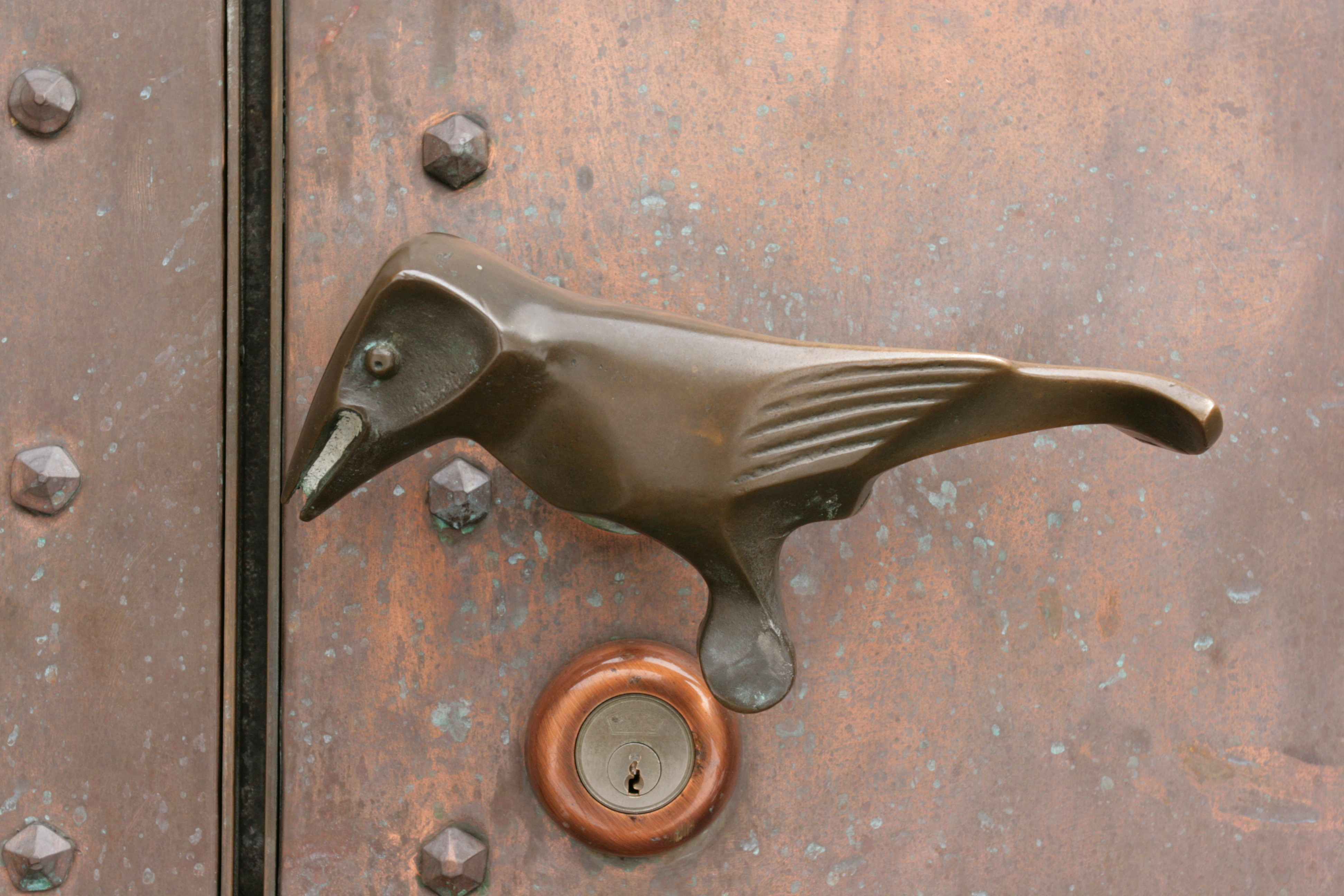 St. Johannes Baptist am Marktplatz in Hattingen-Blankenstein